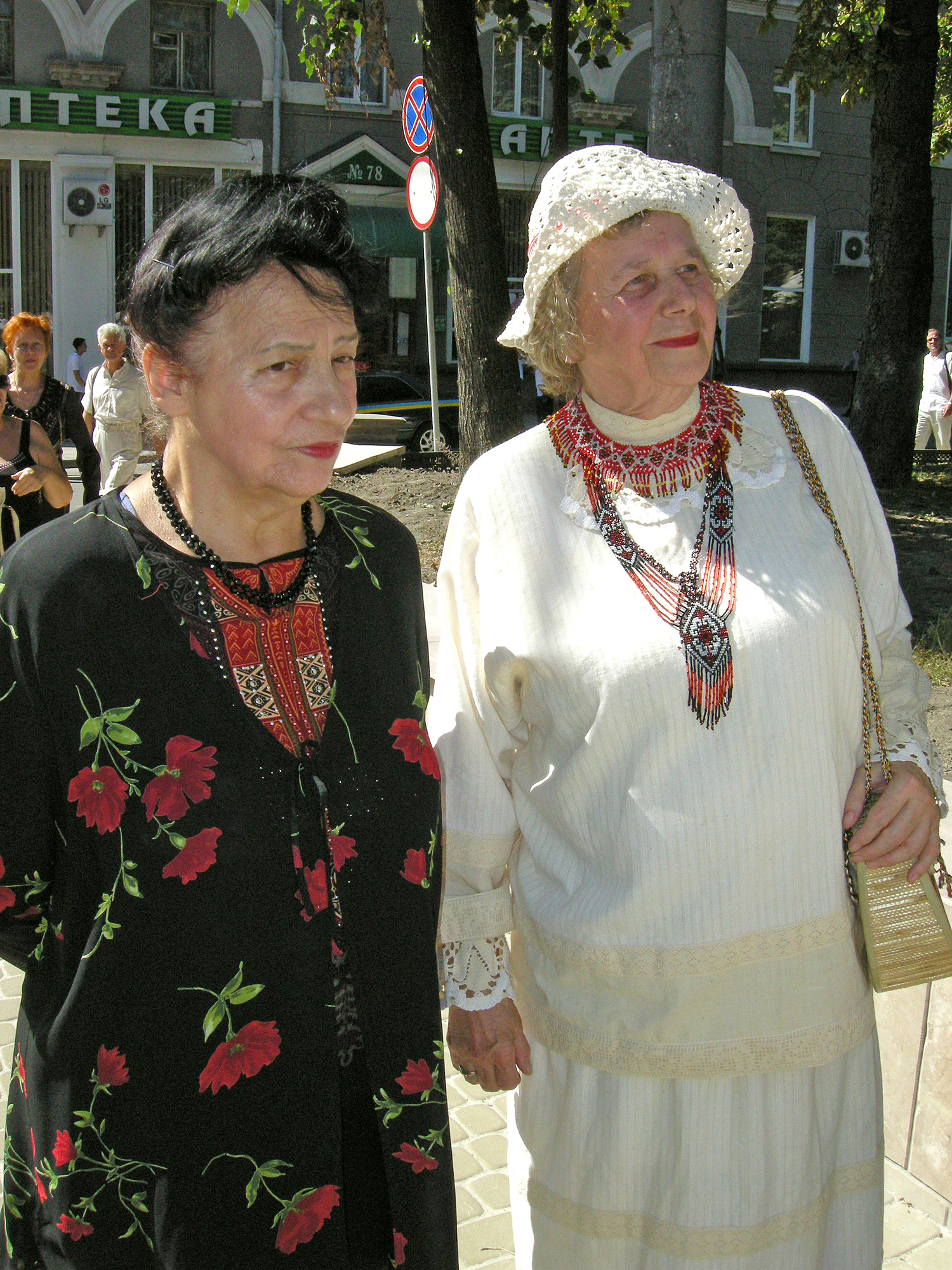 Тернопільські художниця, літераторка, поетеса, авторка-виконавиця пісень Богдана Дурда і письменниця, майстриня народної творчості Марта Чопик.